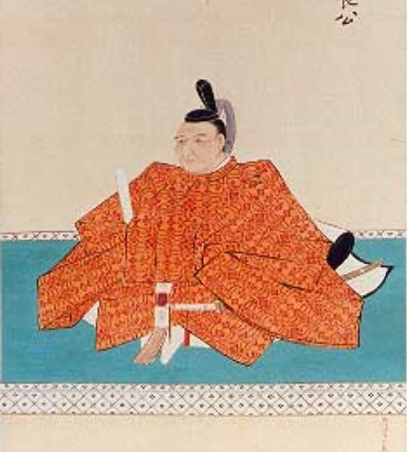 溝口直養の肖像。